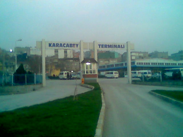 Karacabey Terminali